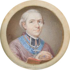 Беларуская (тарашкевіца): Партрэт Адама Нарушэвіча (Adam Naruševič)